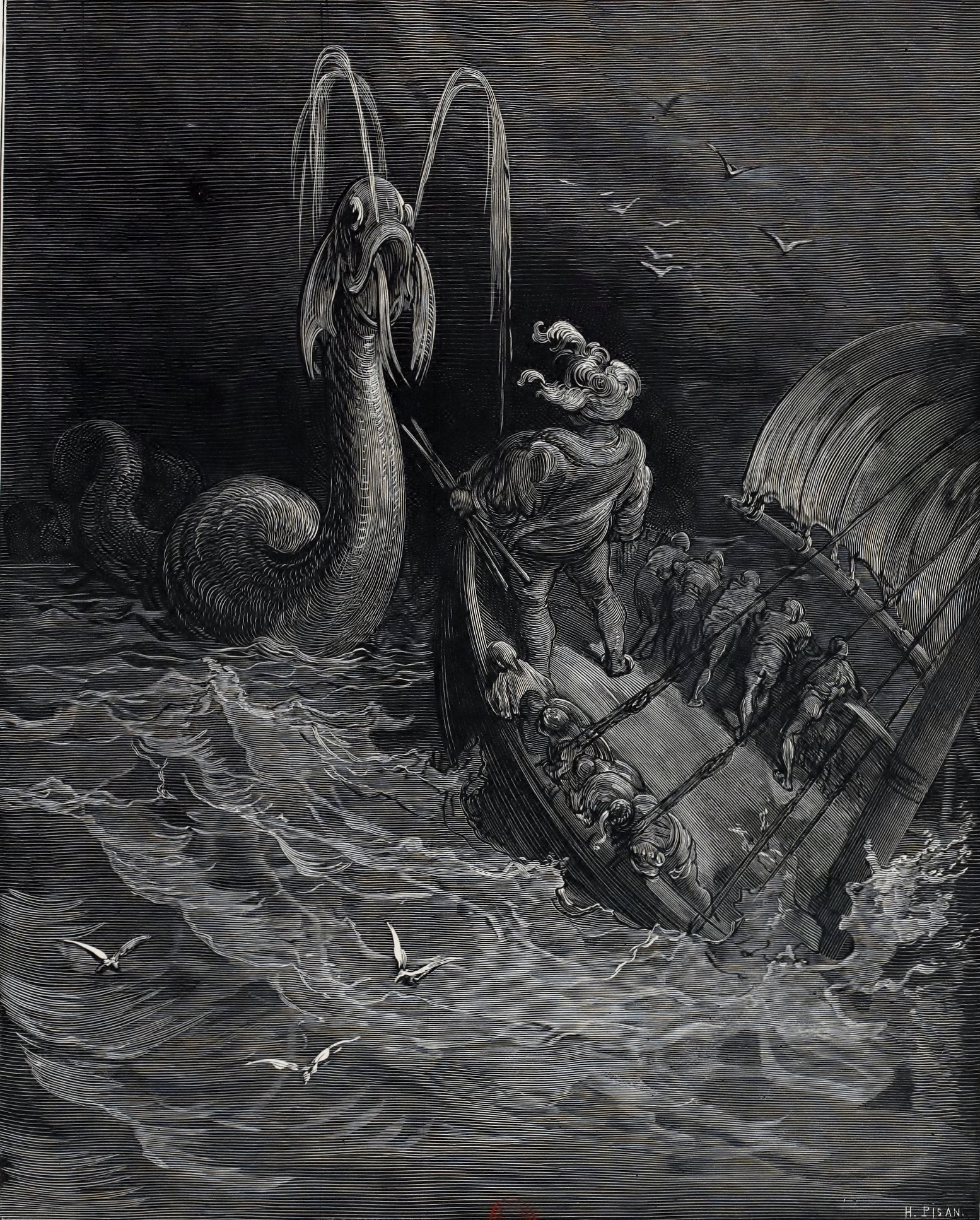 Le Physetere est un monstre marin qui affronte les compagnons de Pantagruel dans le Quart Livre de Rabelais (chapitre 33). Gravure de Gustave Doré dans l'édition de Garnier Frères, 1873. .